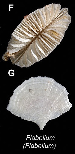 Recorte de imagen ZooKeys